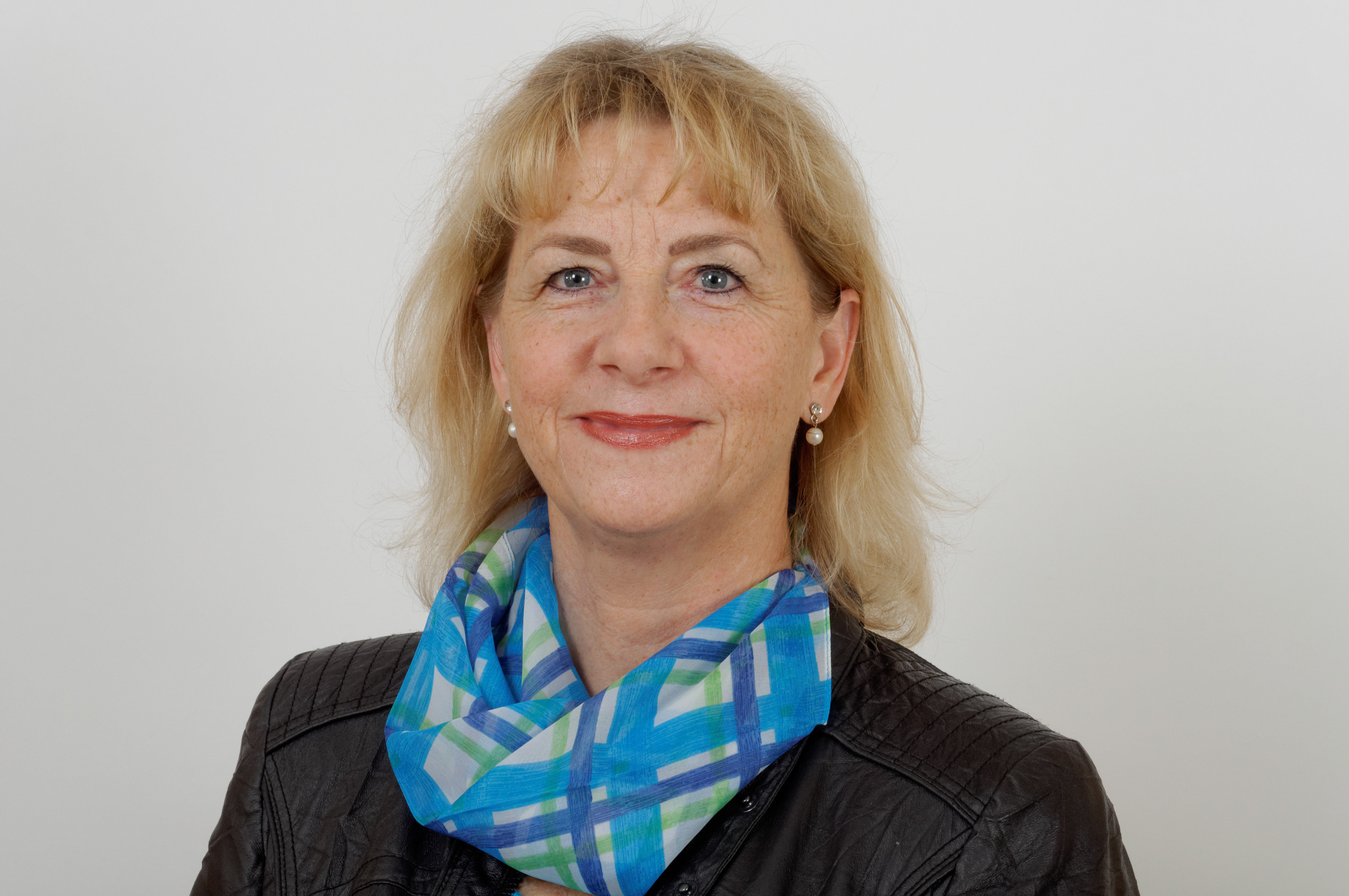 Landtagsprojekt Hessen